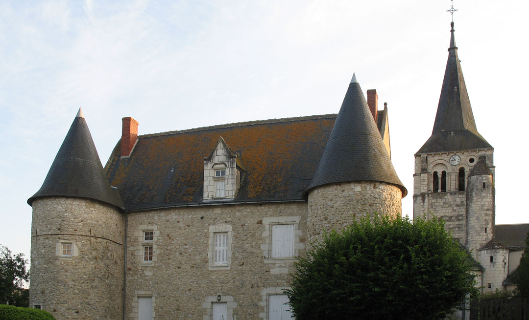 Louans, Indre-et-Loire, France